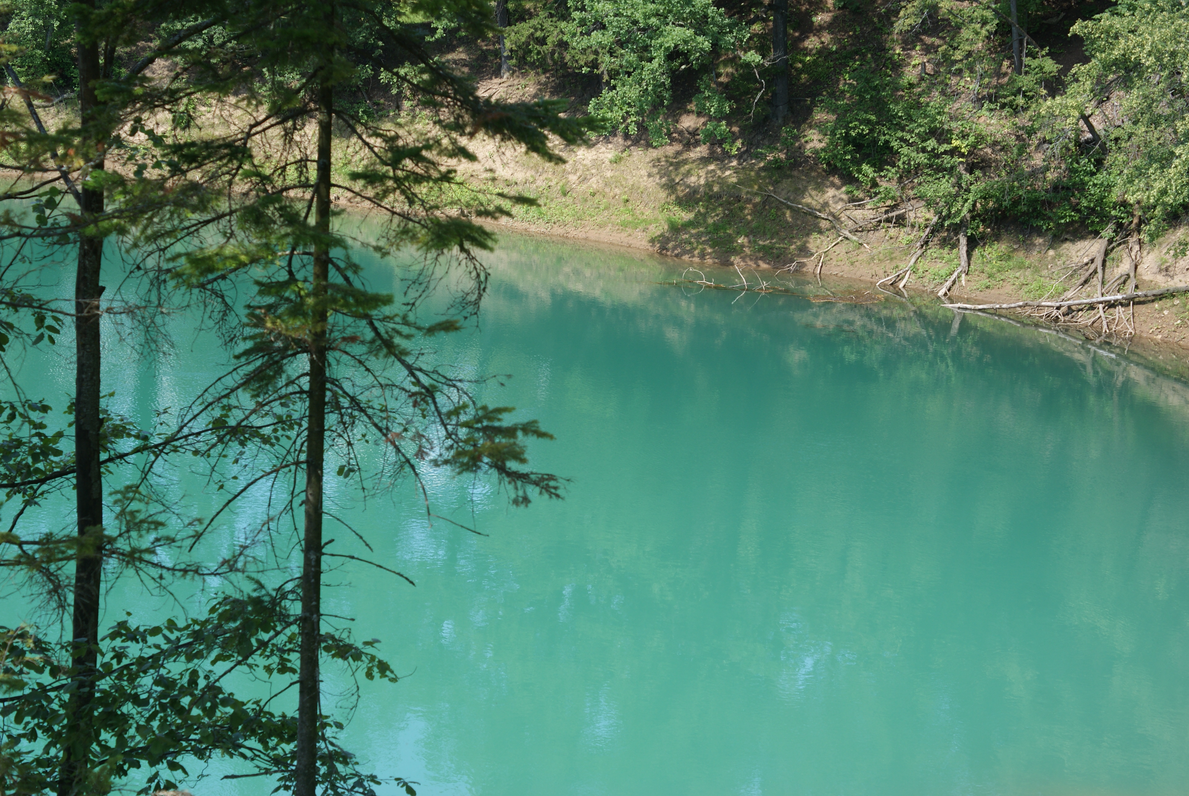 Источник Красный Ключ: Нуримановский район, Башкортостан This image is related to the protected area of Russia number 0210189